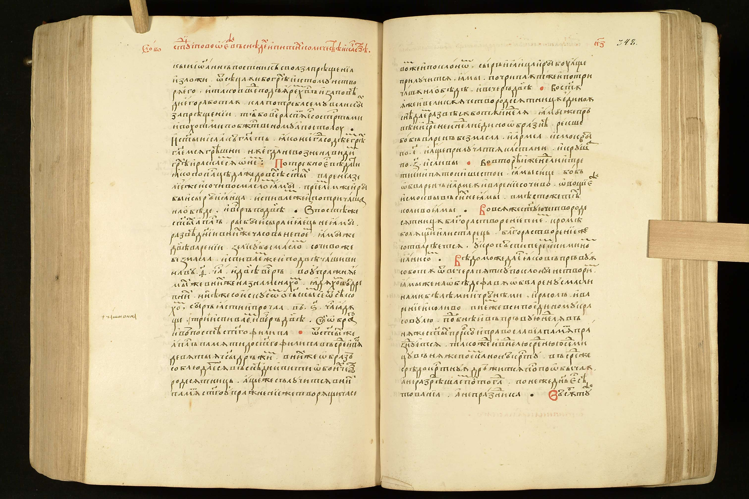 Фрагменты Ипотипосиса — «Студитово о снедех и питиих количестве и качестве». 57 Слово, Пандекты (Никон Черногорец), рукопись ХVІ века.